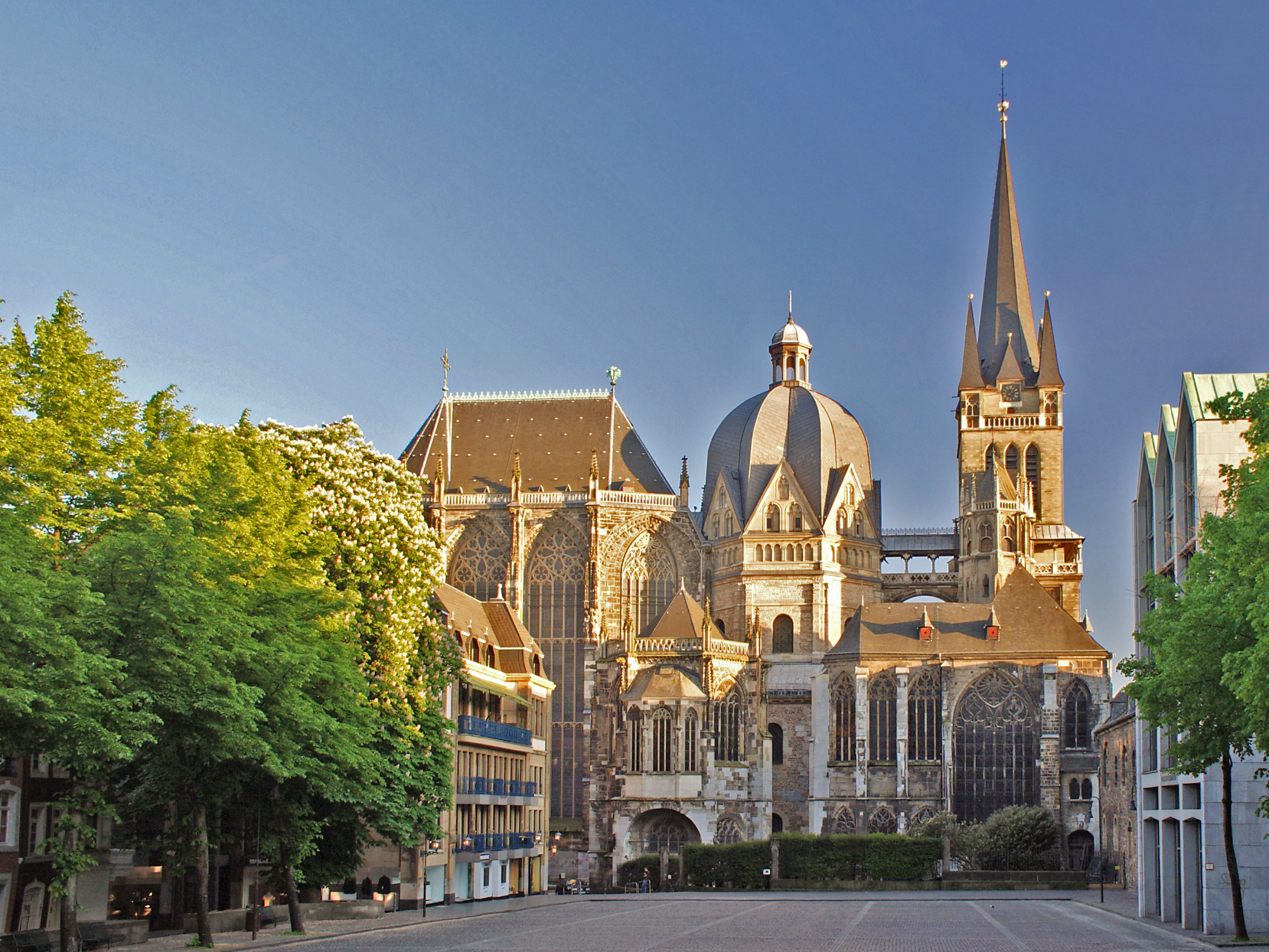 Sujet:Oochener Doum vun Norden hier Source:ex-Commons/ Foto vum Aleph a senger EOS 350D